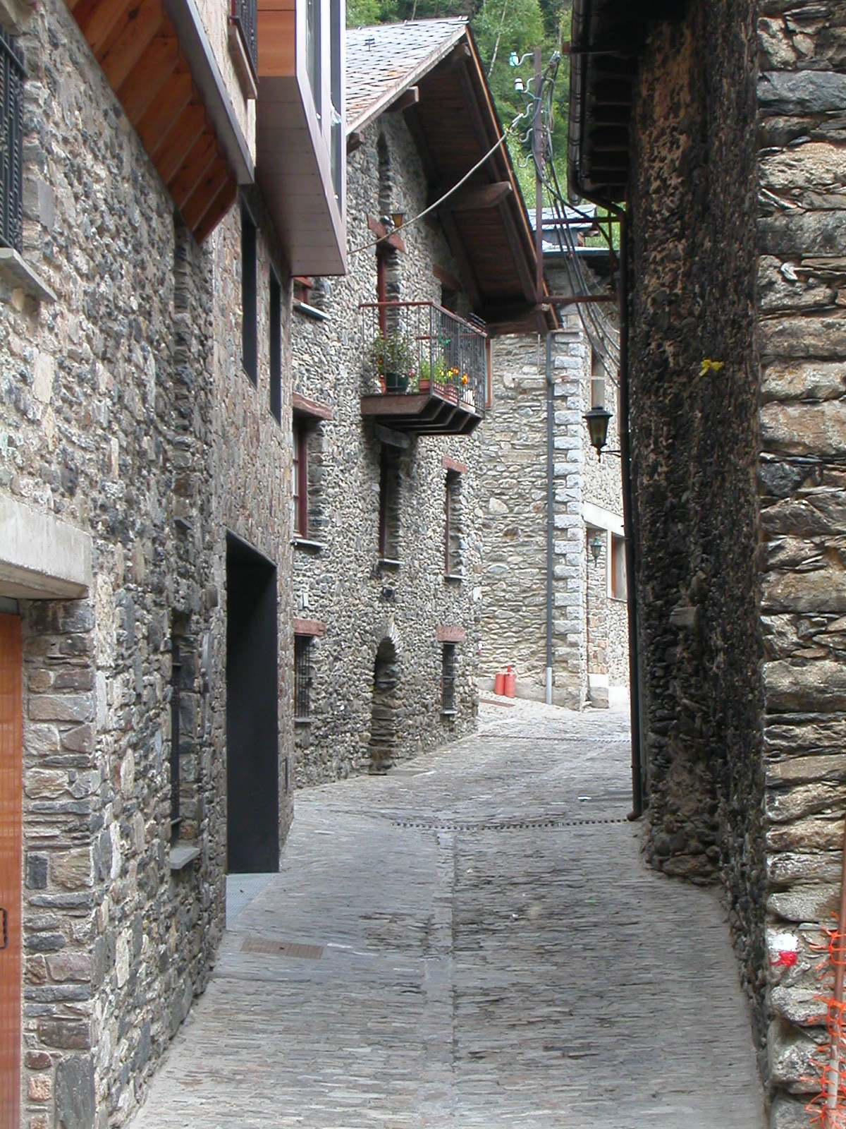 Ordino, Andorra